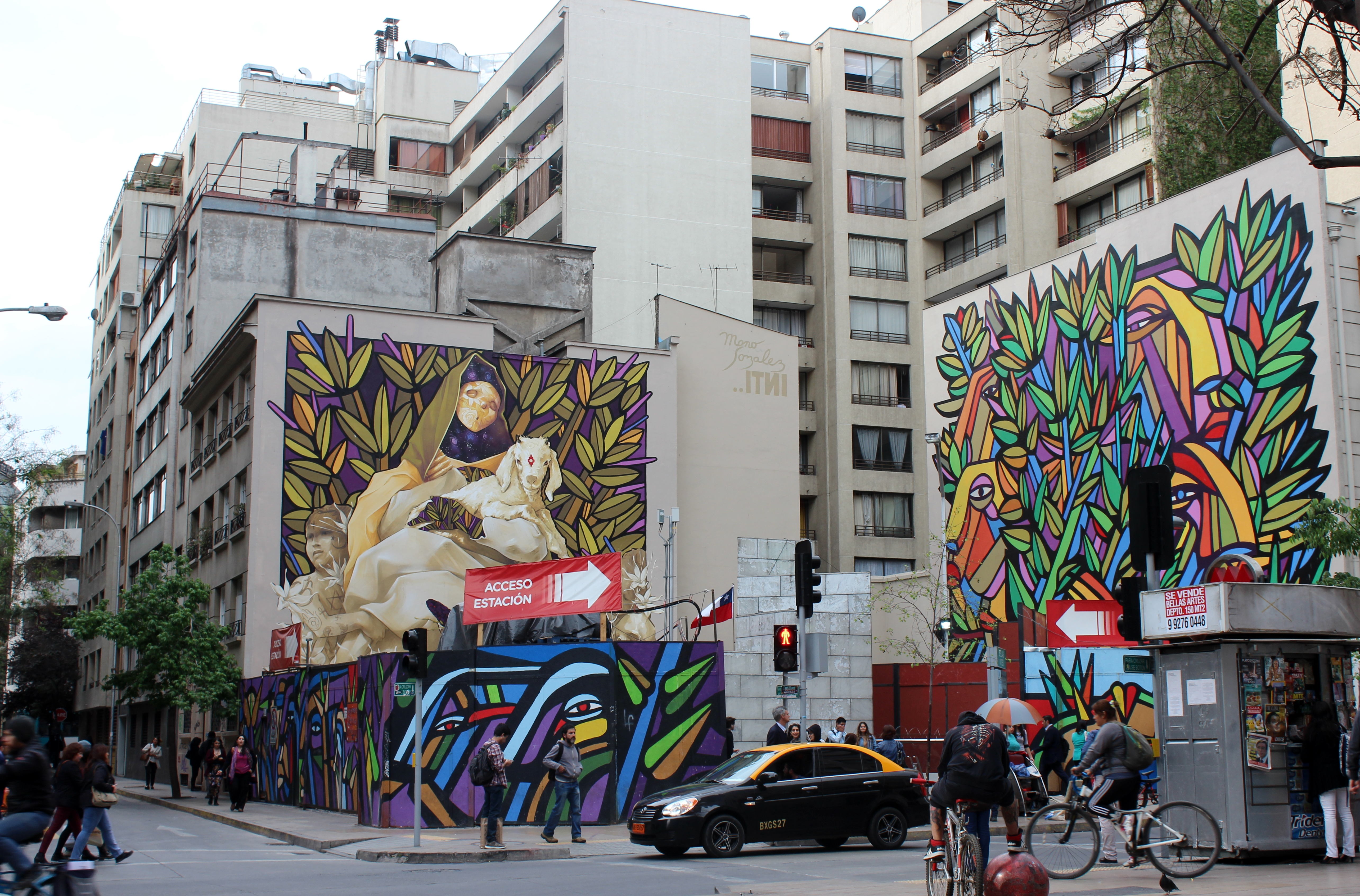 Acceso al metro Bellas Artes con los murales de Inti Castro (Virgen con cordero, pared norte) y Mono González (mural oriente, a la derecha, y hojas en el de Inti). Esquina noreste de la calle Monjitas con Mosqueto, Santiago de Chile. Foto tomada desde la calle Mosqueto.